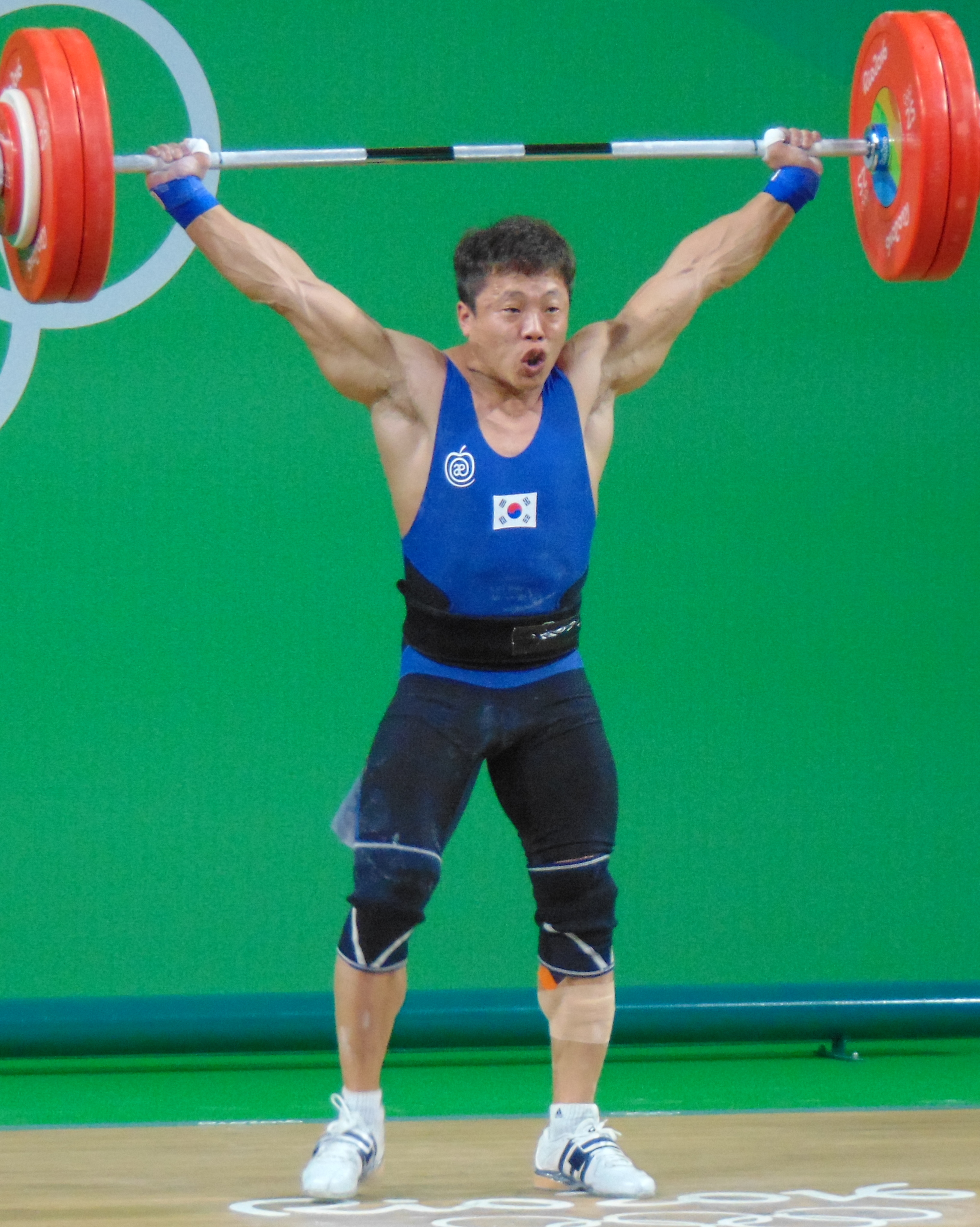 Rio 2016 - Weightlifting men's 69 kg